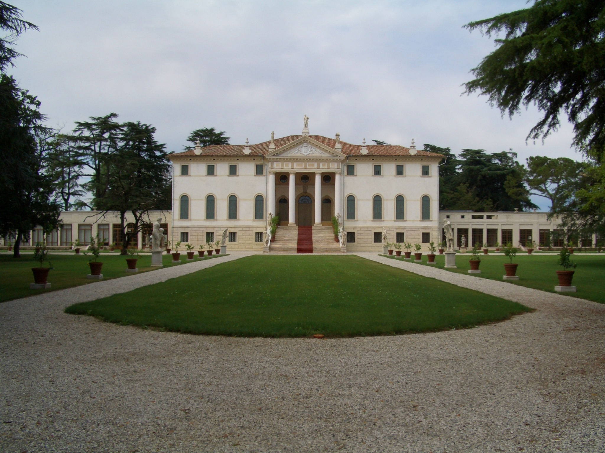 Vista frontale di Villa Corner a Cavasagra